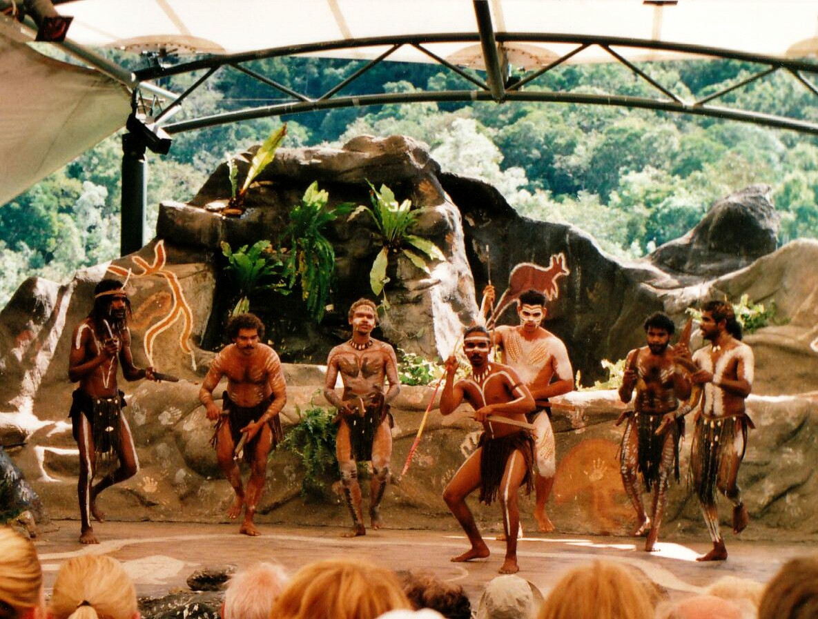 Vorführung der Tjapukai